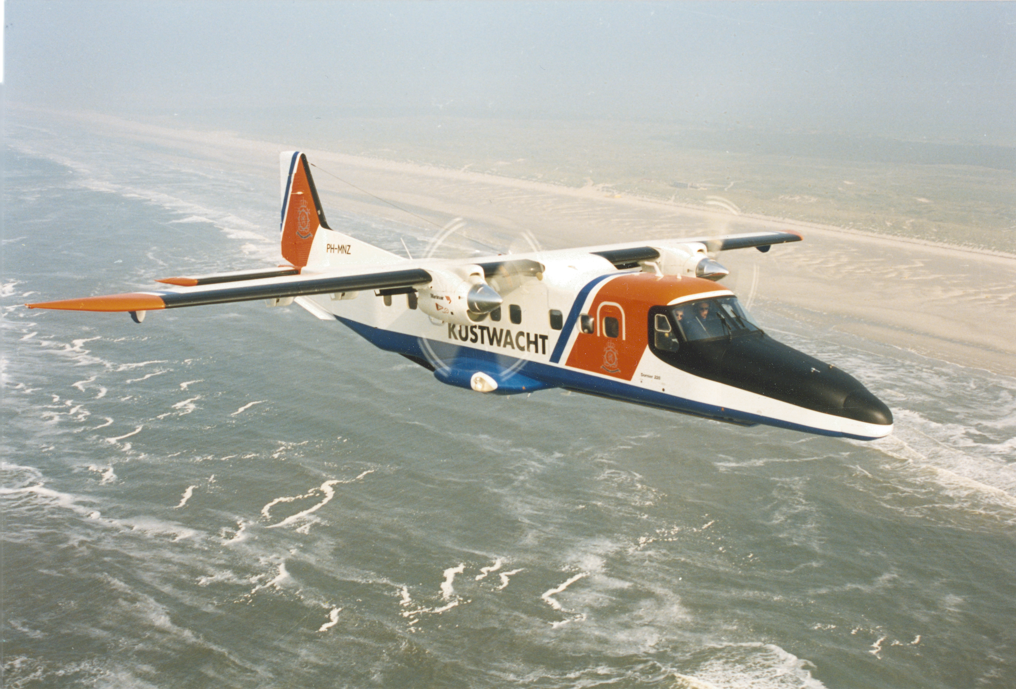 Dornier PH-MNZ die meer dan 15 jaar in dienst is geweest en ongeveer 15000 vlieguren heeft gemaakt.